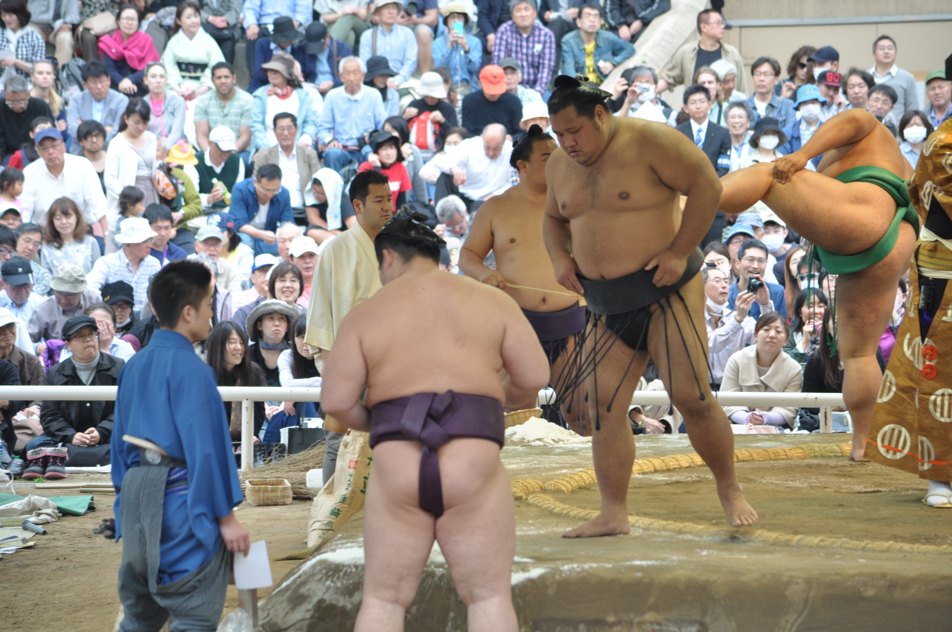 松鳳山 裕也